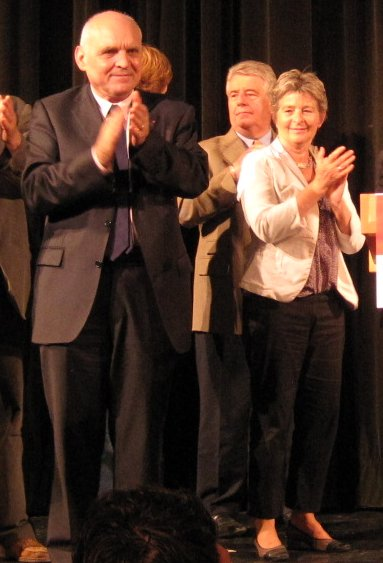 Législatives Doubs 2012 : Claude Jeannerot, Jean-Louis Fousseret et Marie-Guite Dufay